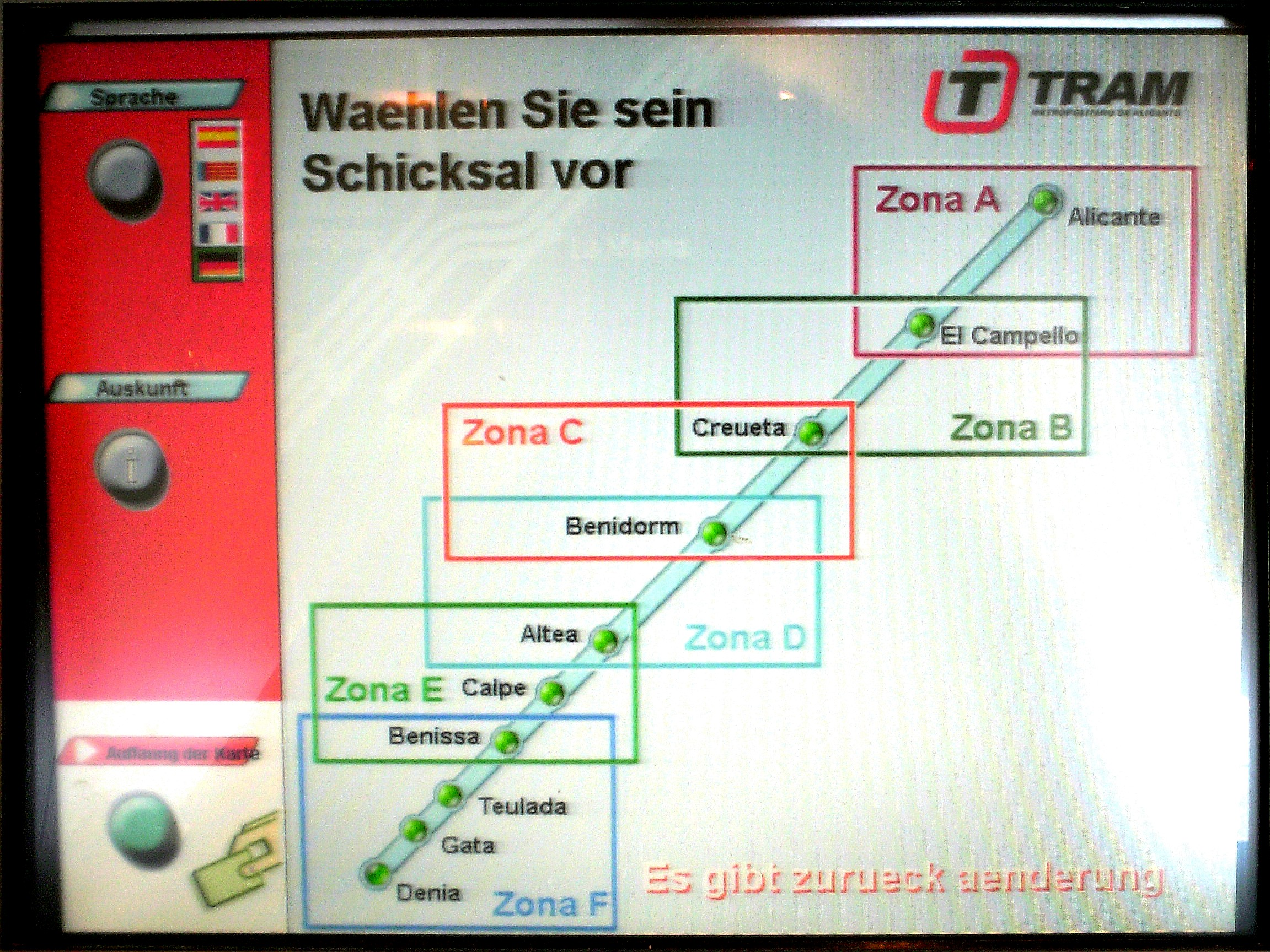 Deutsche Startseite eines Fahrkartenautomates der Stadtbahn Alicante mit etwas misslungener Übersetzung